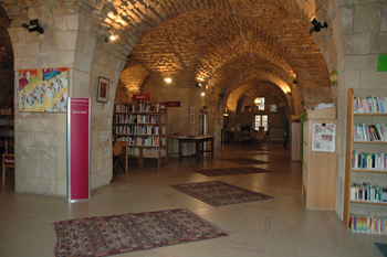 Médiathèque du centre culturel français de DeirElQamar